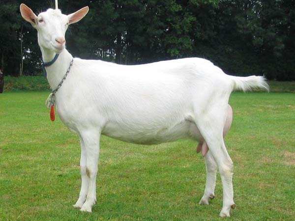 Nederlandse witte geit Categorie:Afbeelding geit